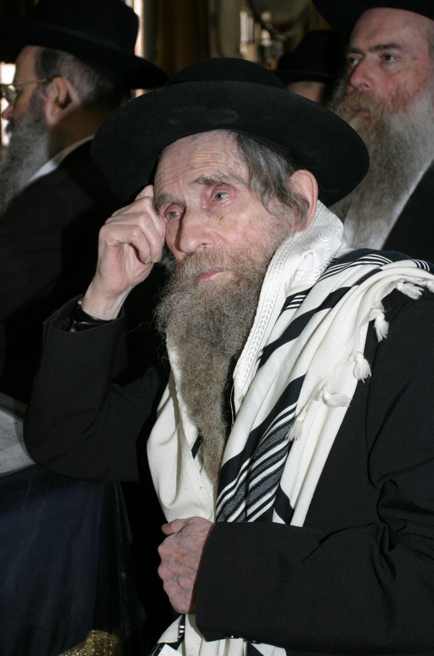 הרב שטיינמן טלית